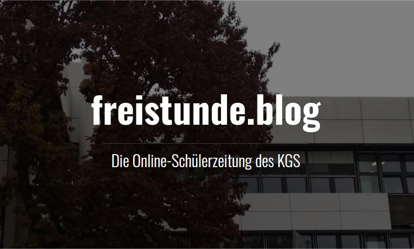 Das Titelbild der online-Schülerzeitung des KGS